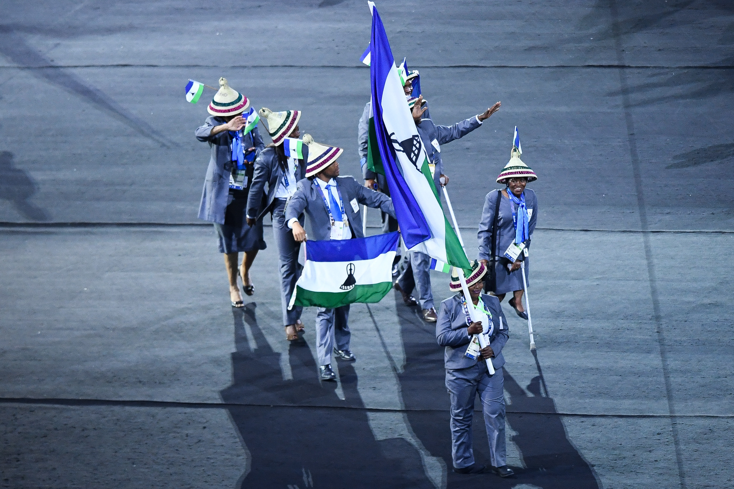 Rio de Janeiro - Cerimônia de abertura dos Jogos Paralmpicos Rio 2016 no Estdio do Maracanã (Tomaz Silva/Agência Brasil)